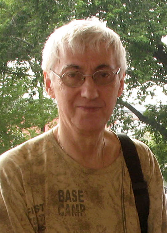 Олег Чухонцев, X фестиваль поэзии на Байкале, Иркутск, июль 2010 года.